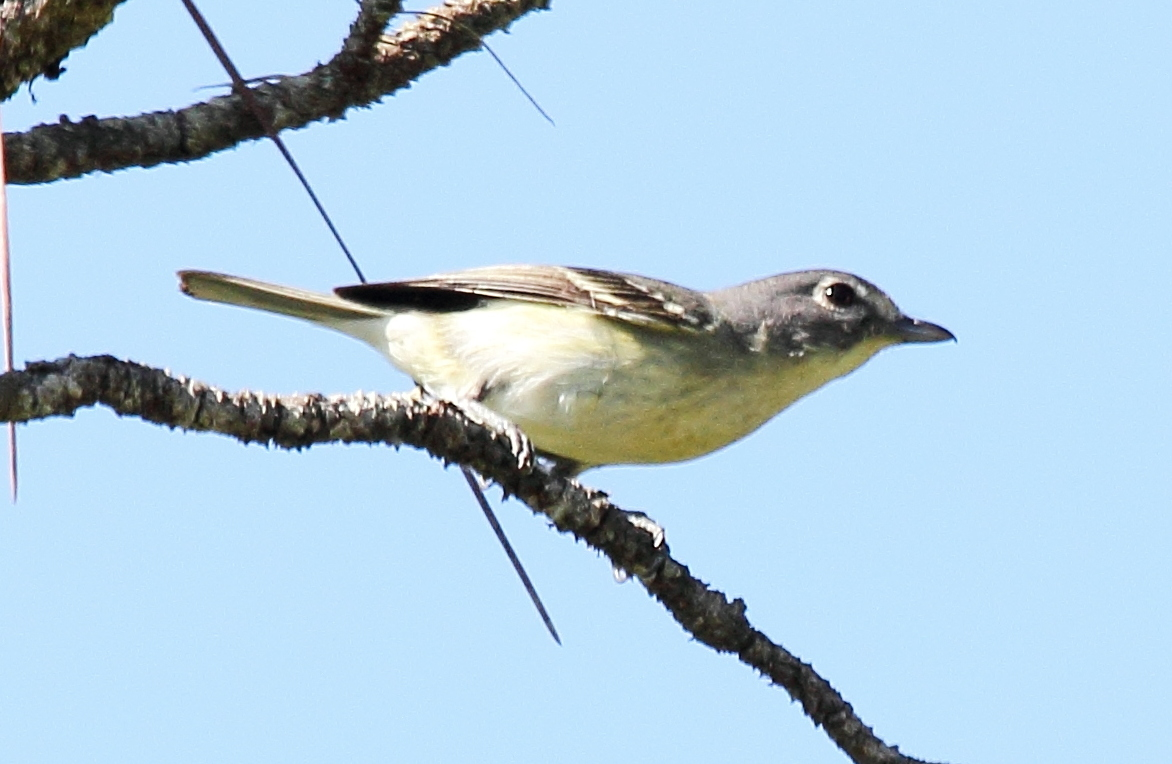 Plumbeous Vireo (Vireo plumbeus)